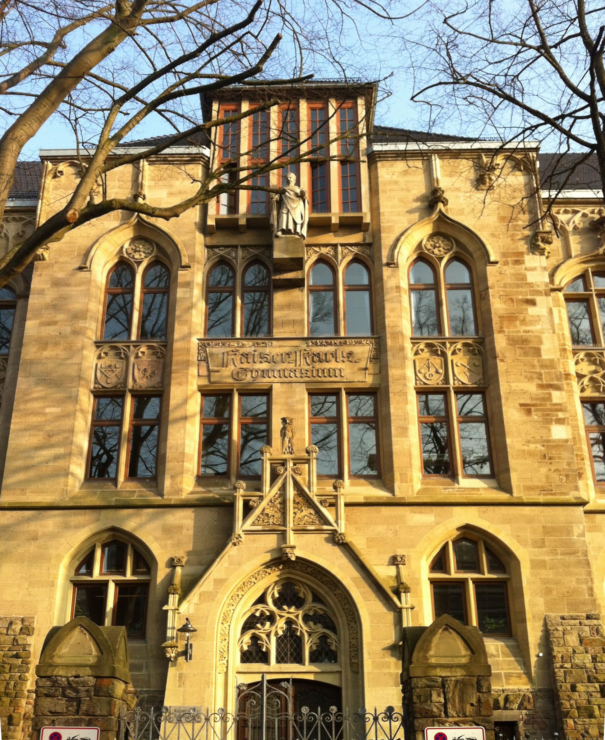 Hauptportal des Kaiser Karls-Gymnasiums in Aachen (1888-1903 errichtet)This is a photograph of an architectural monument., no. 0